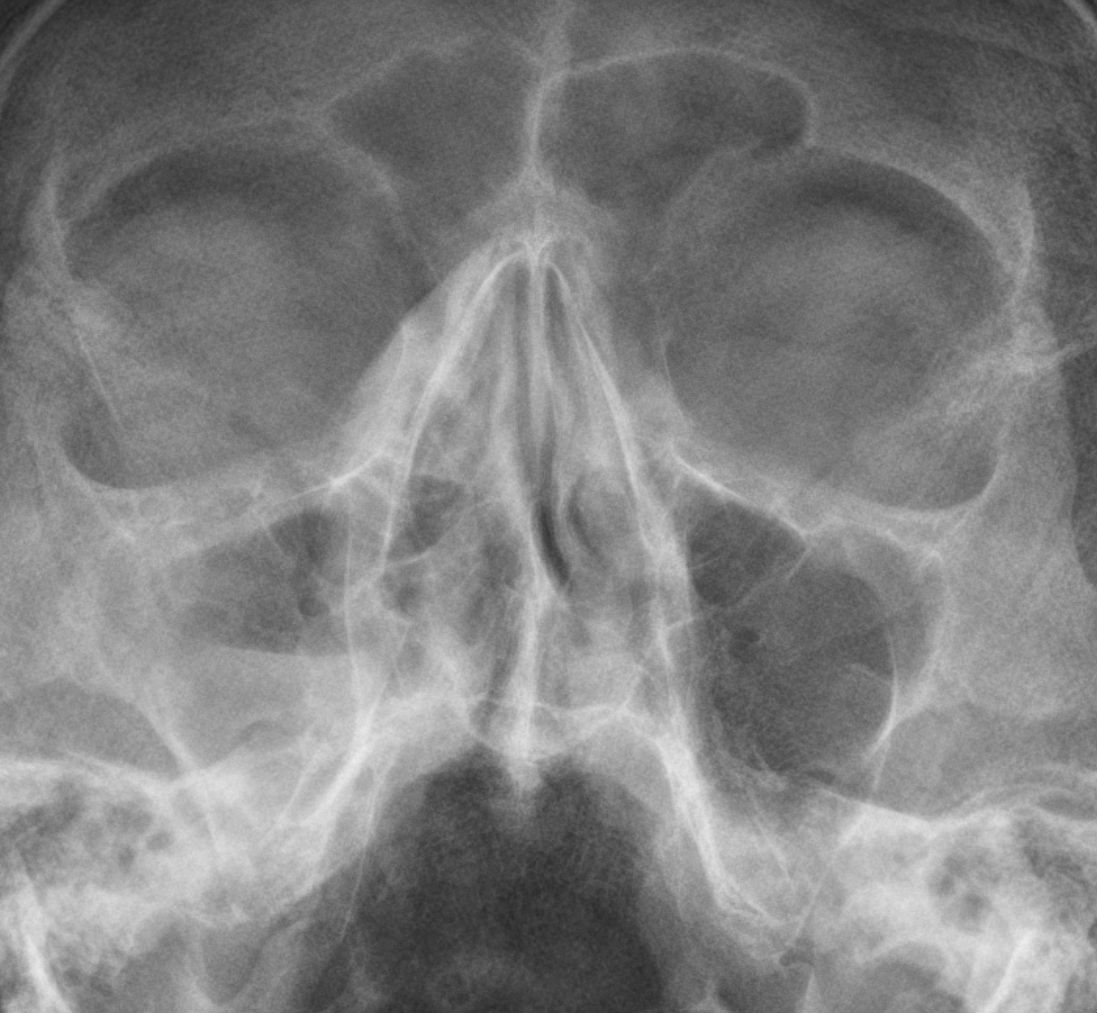 Sinusitis maxillaris (Kieferhöhlenentzündung) rechts also links im Röntgenbild. Man erkennt deutlich den Luft-Flüssigkeitsspiegel.